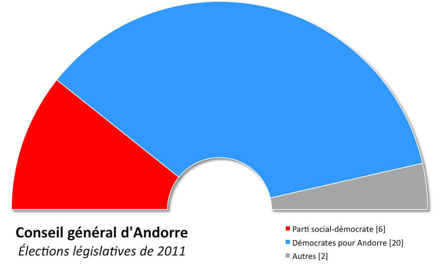 Composition politique du conseil général d'Andorre après les élections d'avril 2011.